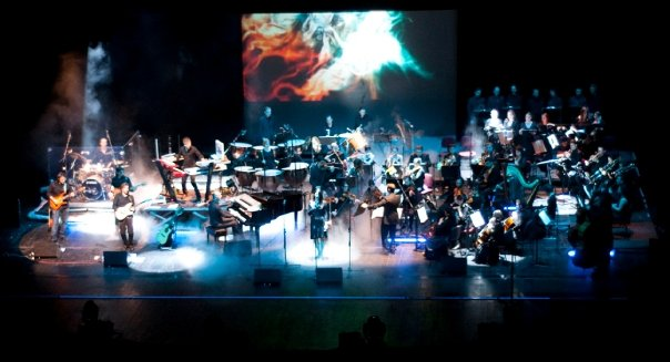 From Hell To Heaven